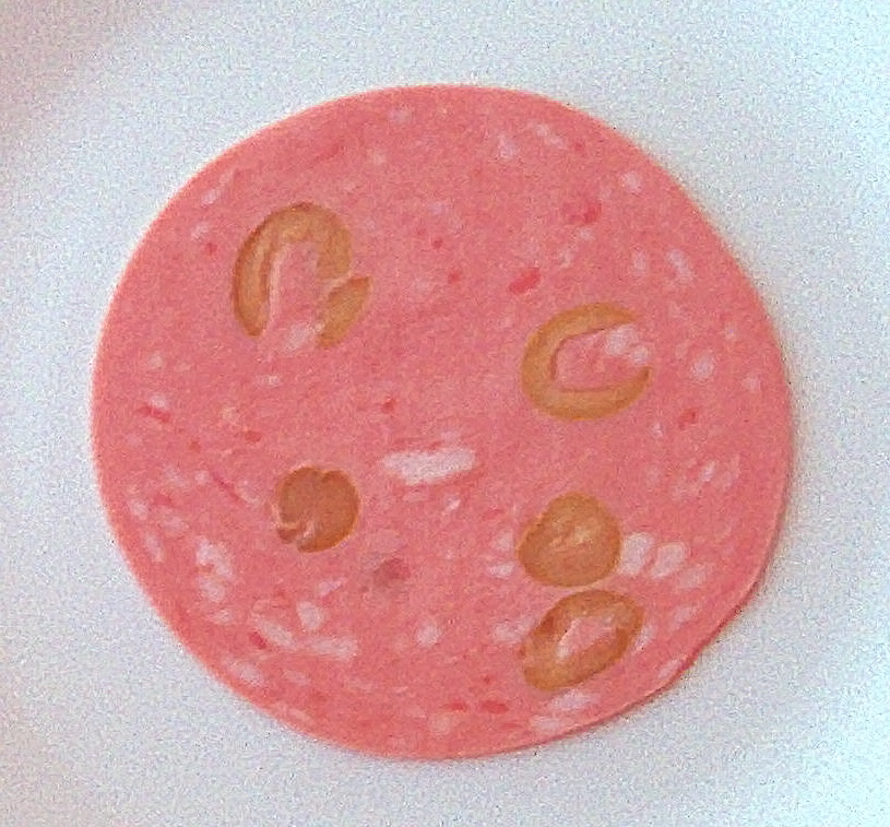 Mortadela portuguesa com azeitonas. Portuguese mortadella with olives.